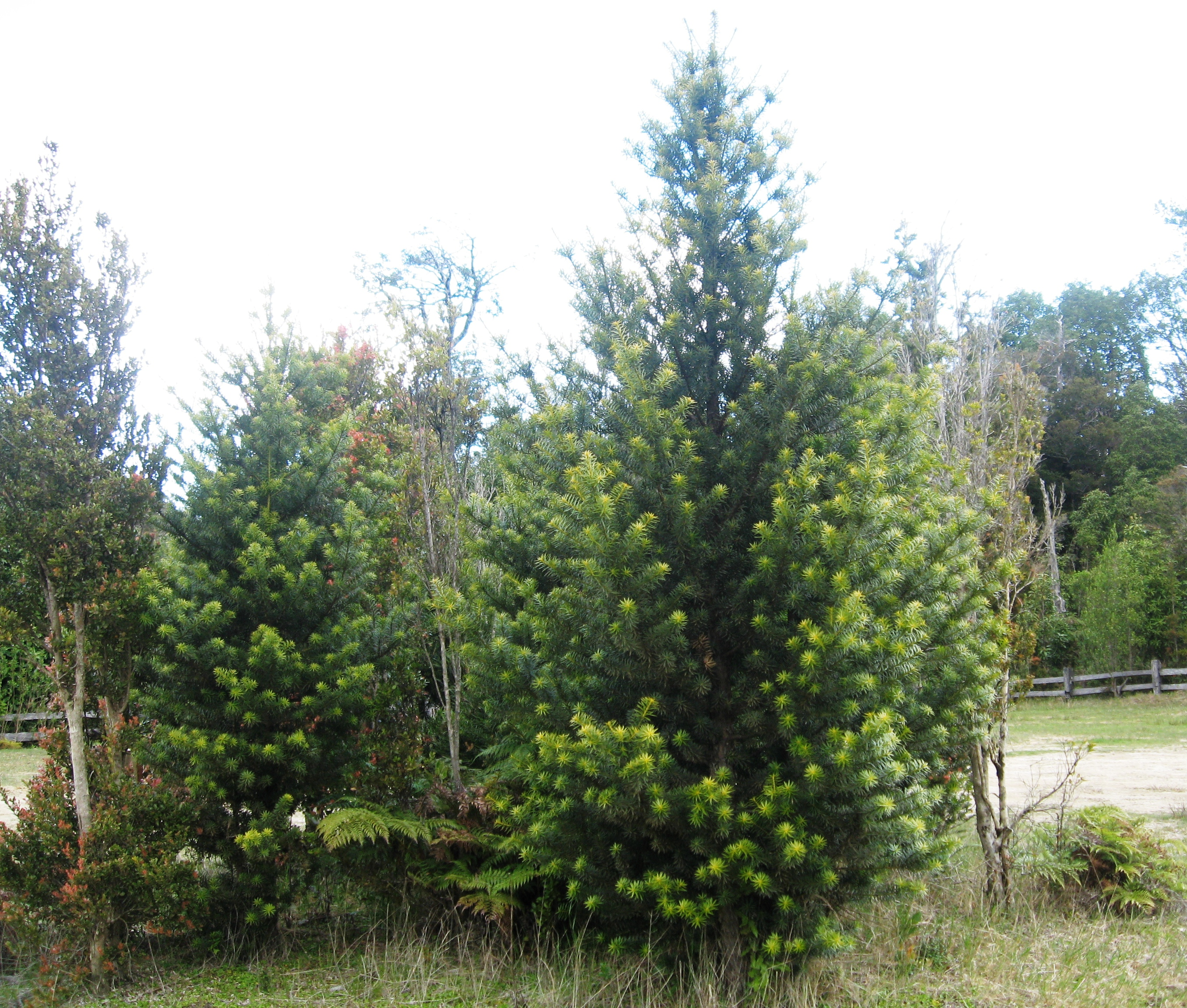 Árbol joven de mañío hembra (Podocarpus nubigenus) en el parque Oncol, región de Los Ríos, Chile